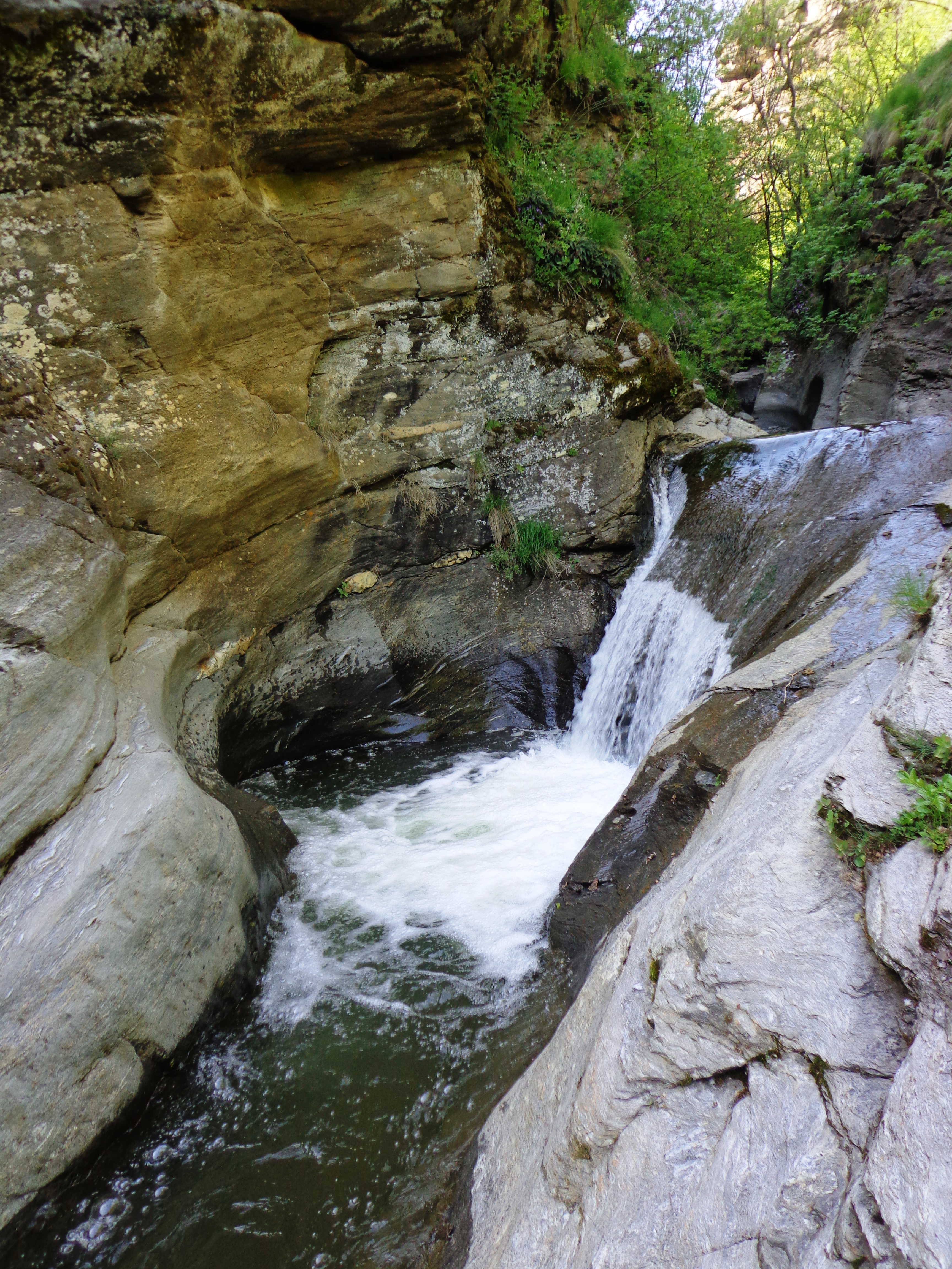 Donji kazan